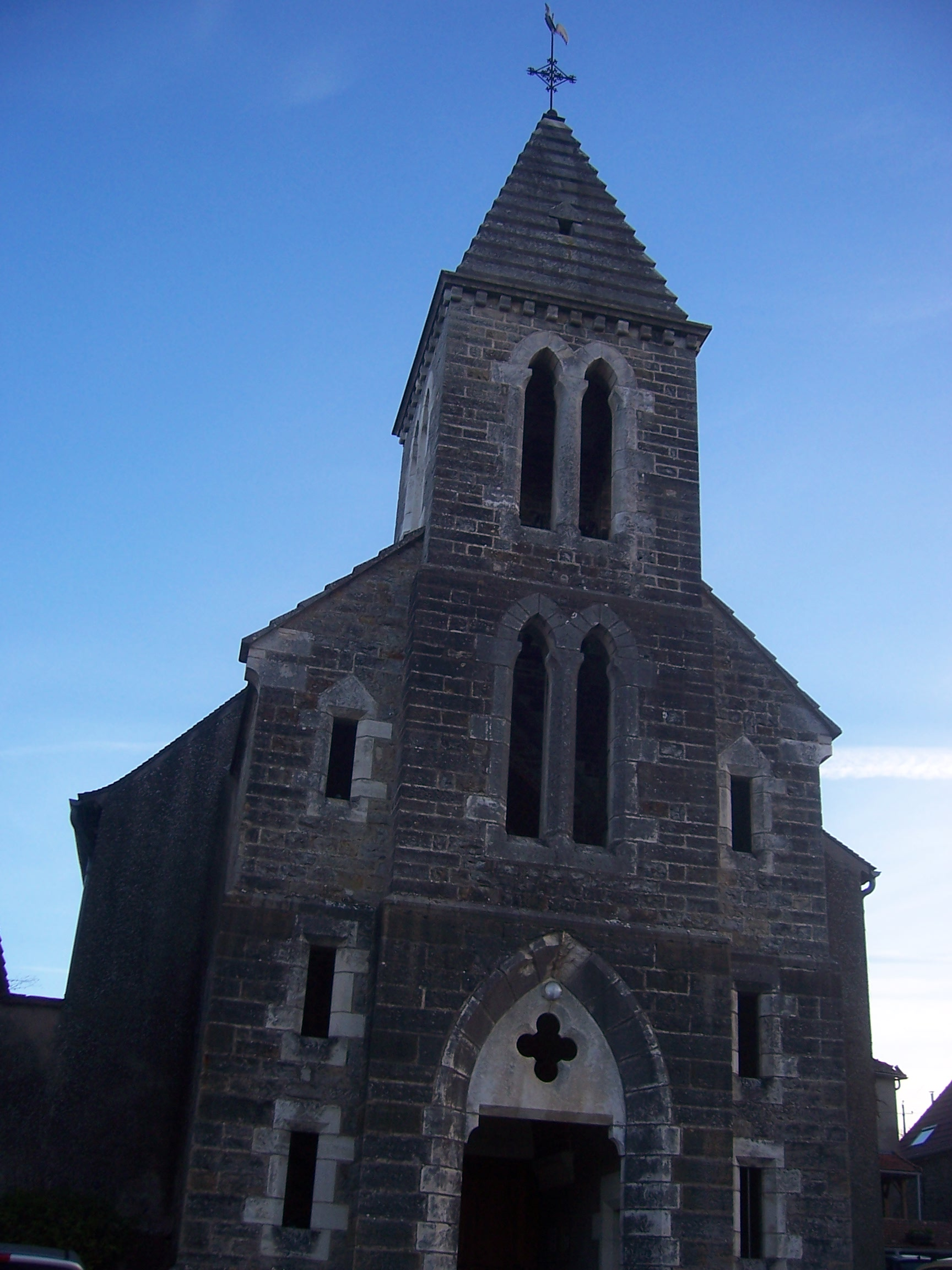 Eglise de Saint-Gilles